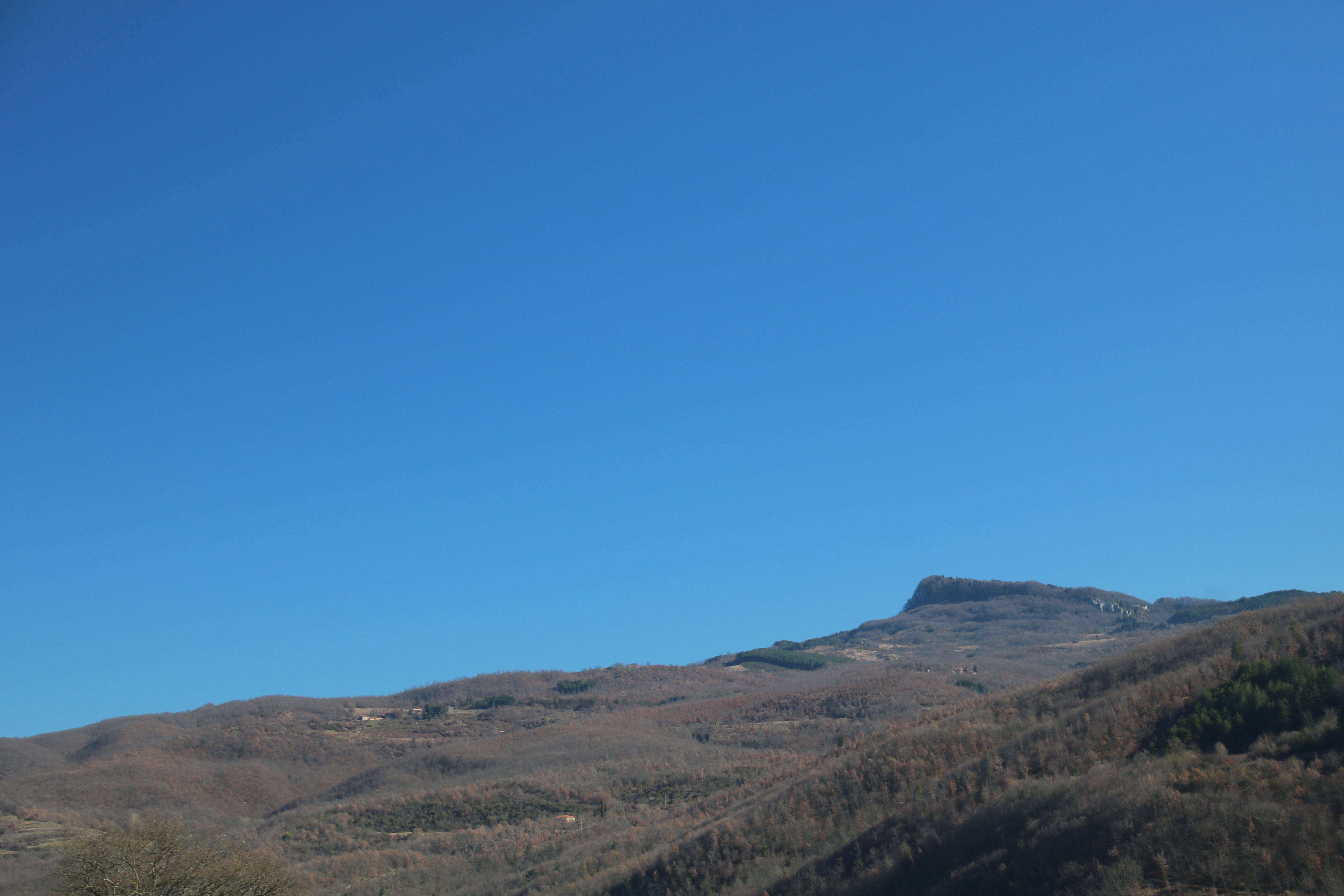 Via Ghibellina, veduta del Monte Penna